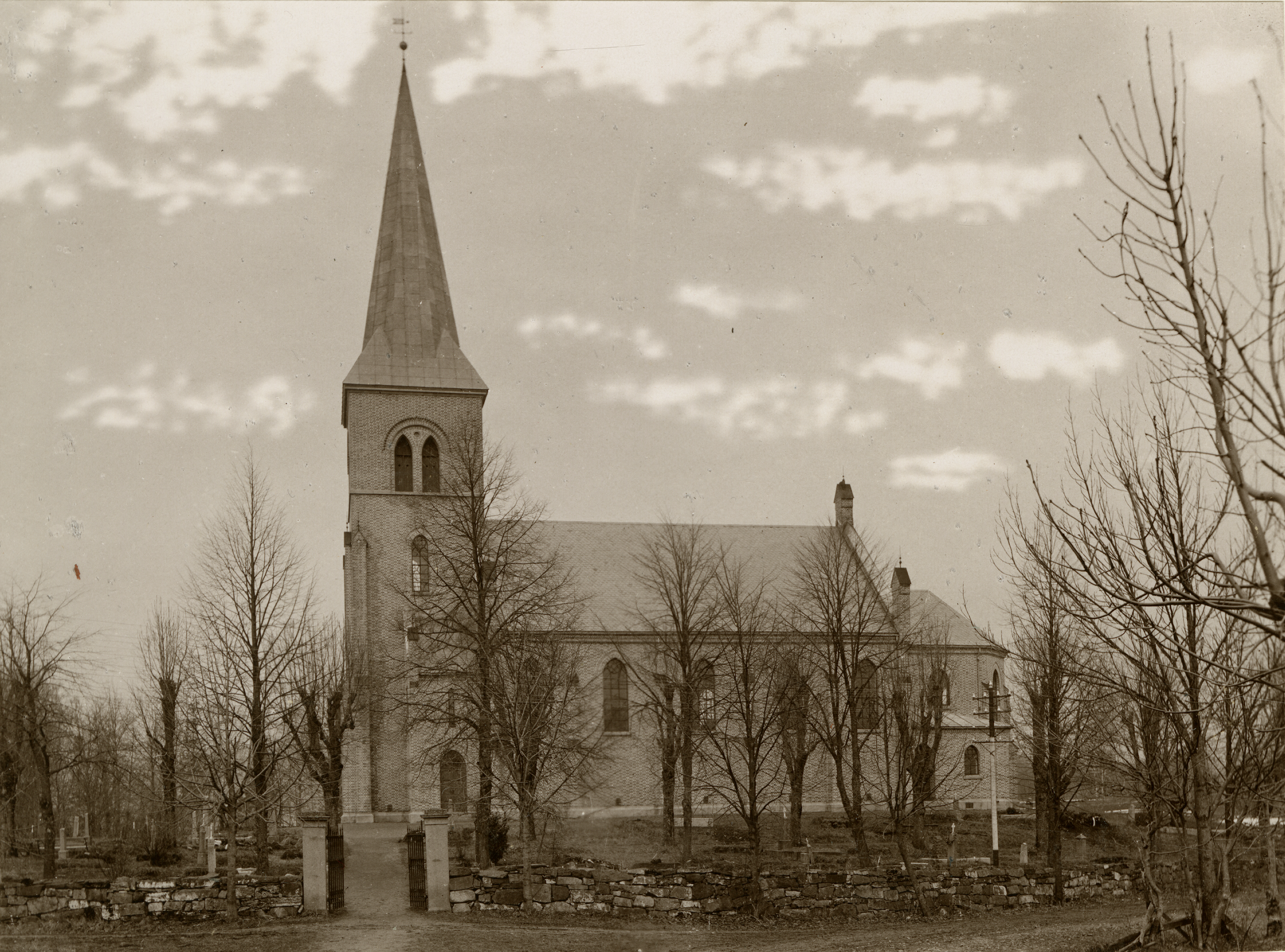 Asker kirke, Akershus This image on crowdsourcing geotagging platform Fotodugnad